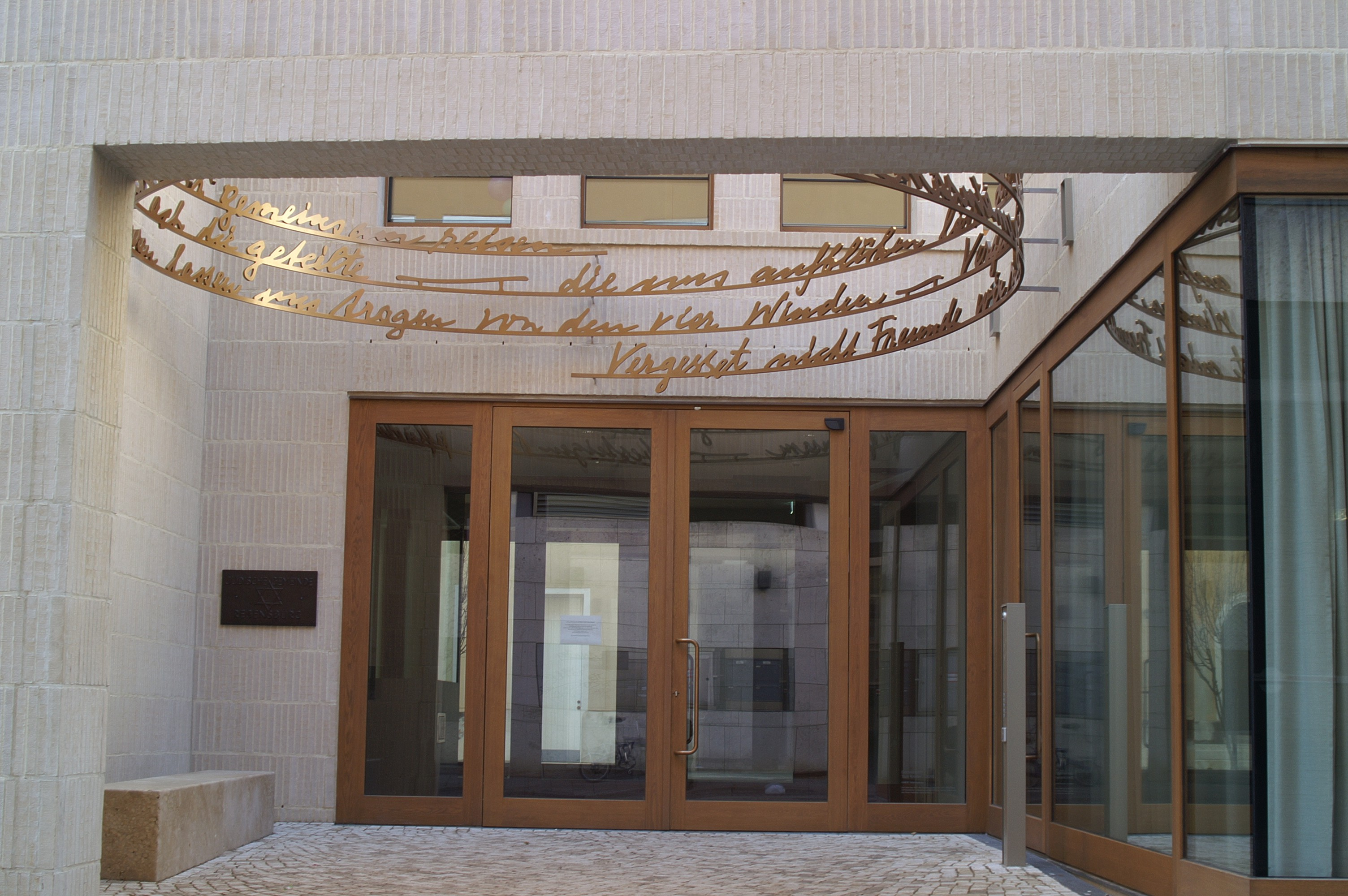 Jüdisches Gemeindezentrum Regensburg Eingangsbereich